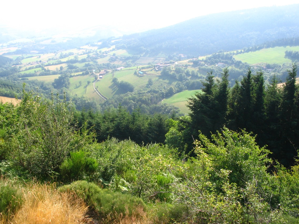 PNR du Pilat à Doizieux, sud de Saint-Chamond, Loire.